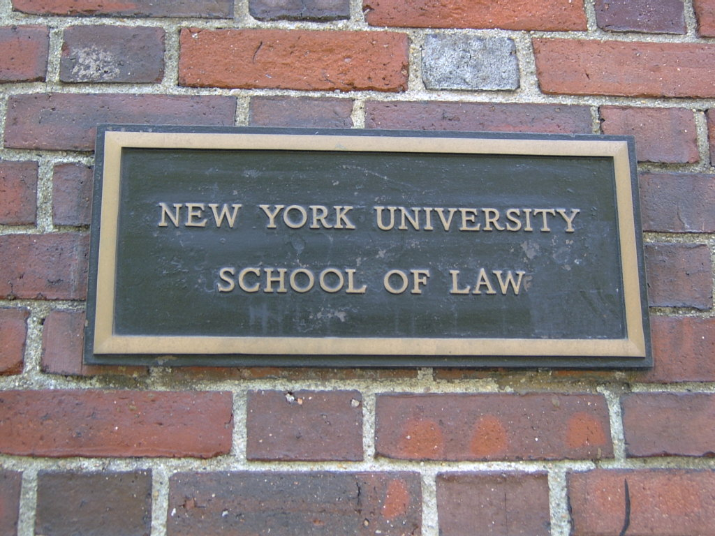 Placa dispuesta en la entrada de Vanderbilt Hall